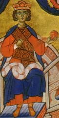 Enrique II de Chipre